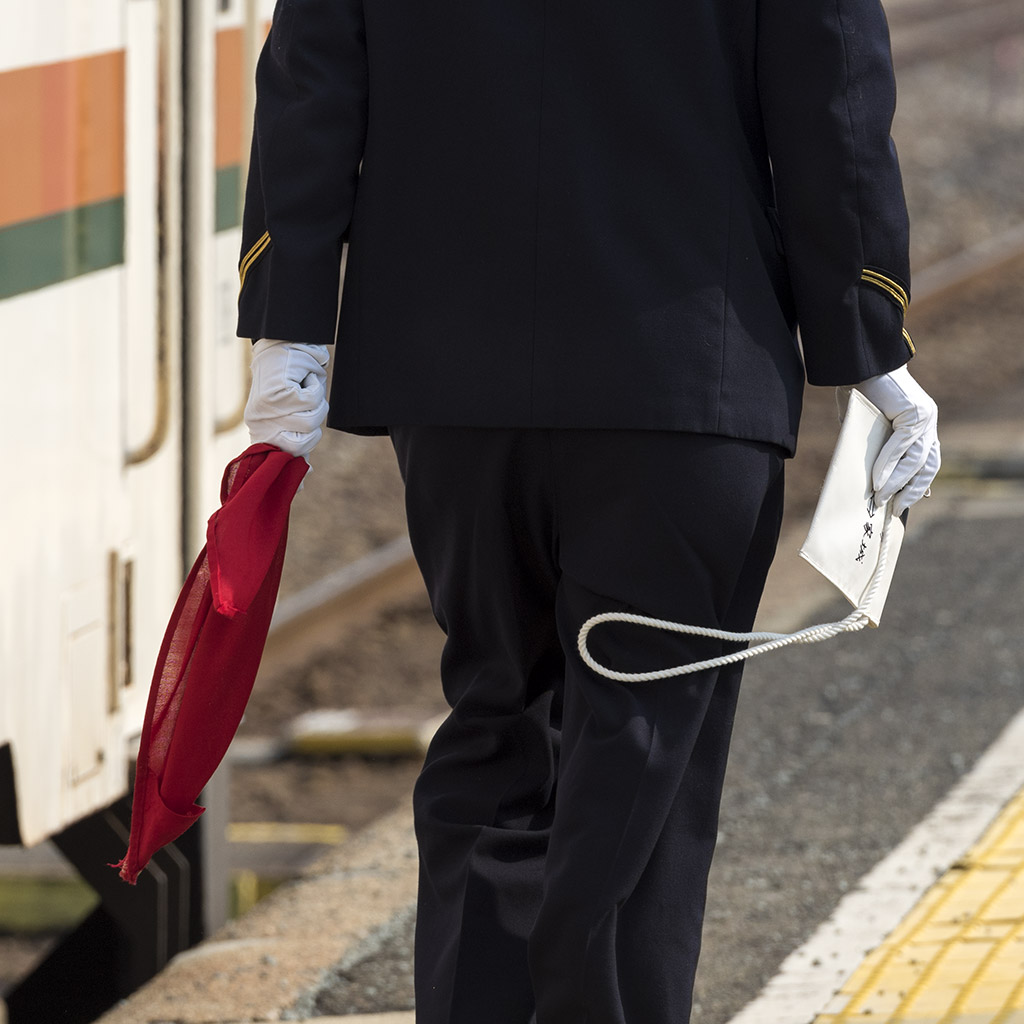 名松線で使用されている通券を運ぶための袋